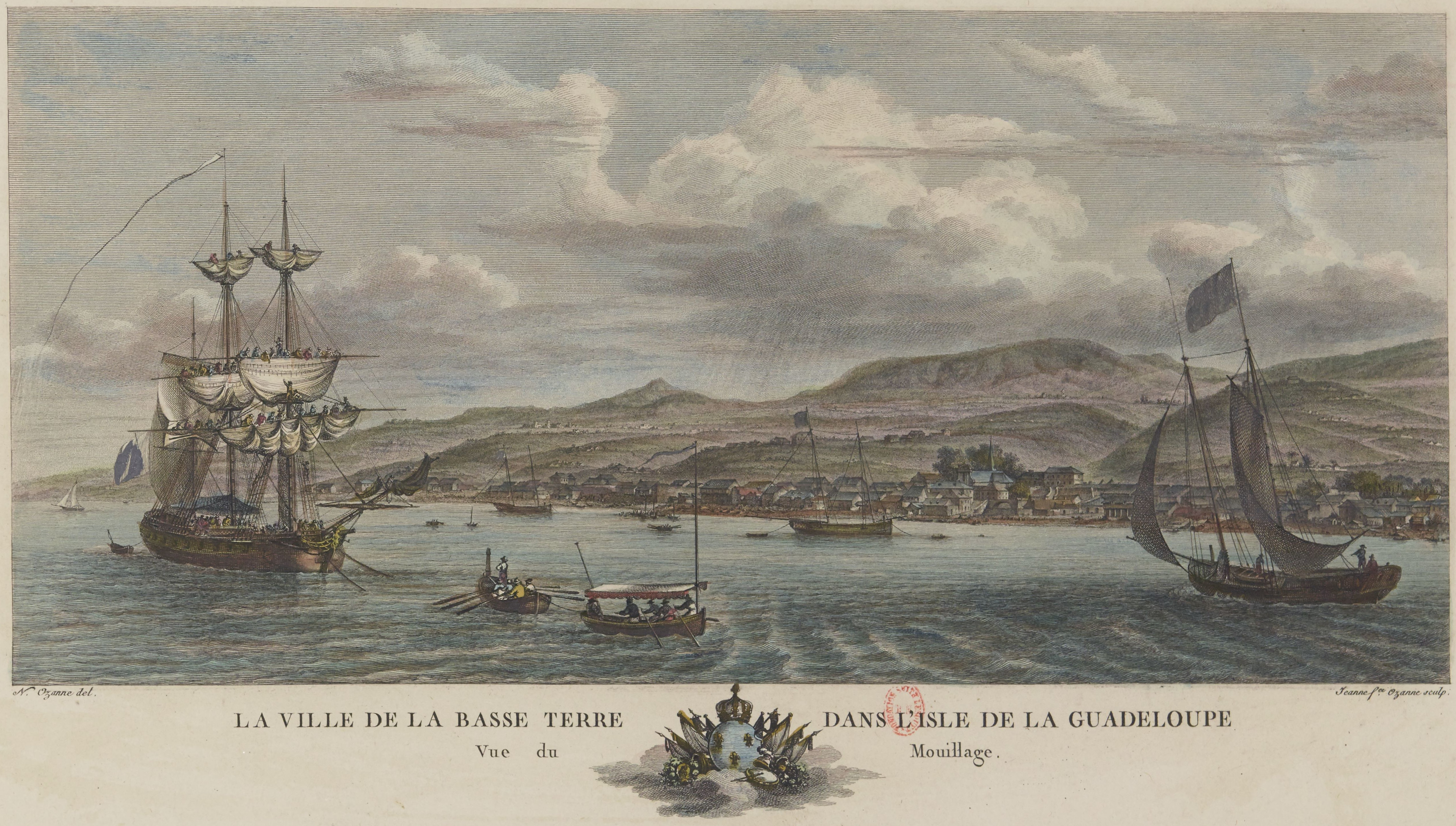 Vue du mouillage de la ville de Basse-Terre en Guadeloupe en 1776. Tiré des Nouvelles vues perspectives des ports de France de N. Ozanne.